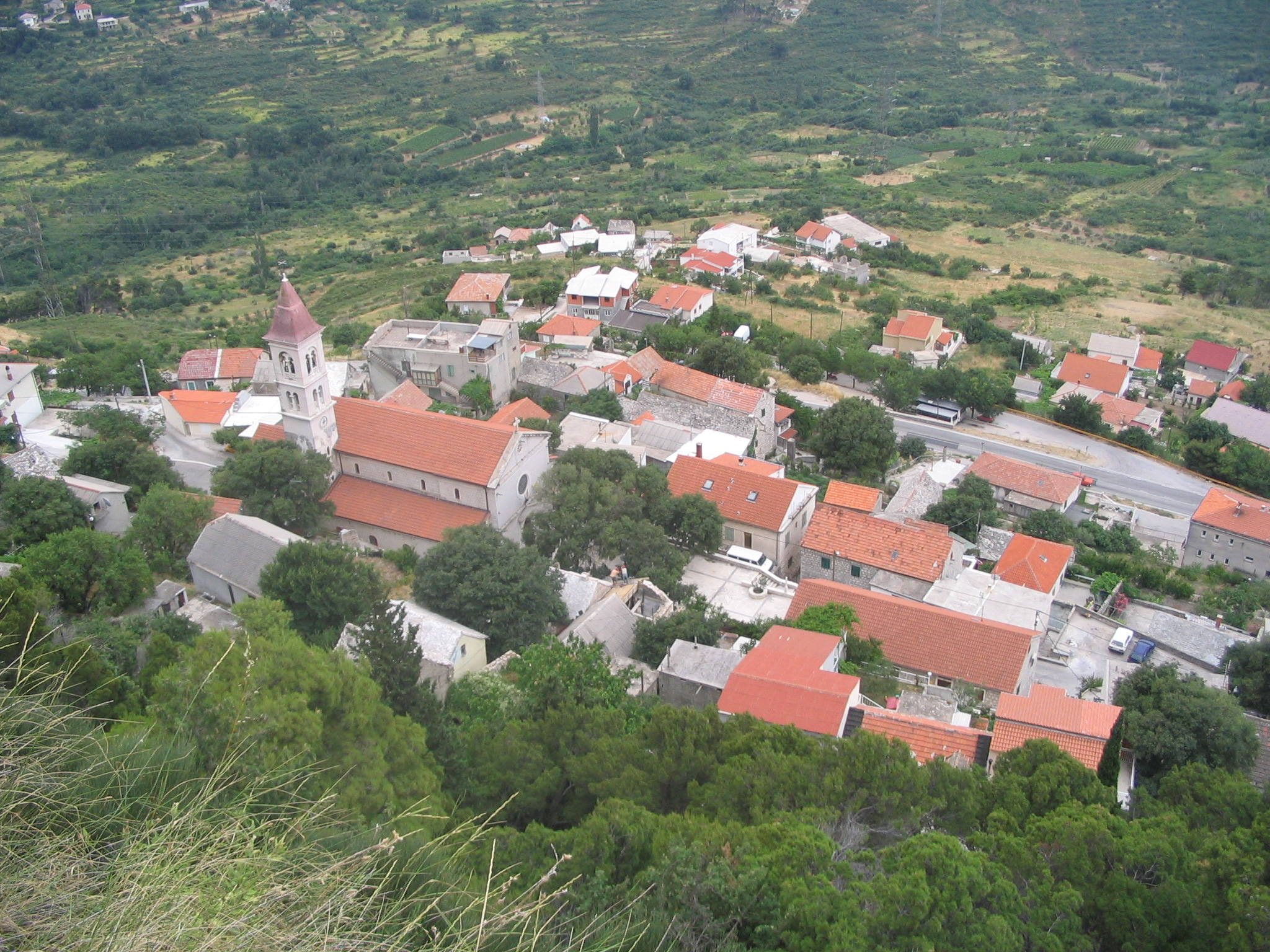 description: Klis seen from the nearby fortress. opis pl: Wieś Klis widziana z pobliskiej twierdzy. author/autor: Gardomir (polish wiki:[1]) source/źródło: a photograph taken by me (fotografia wykonana przeze mnie)